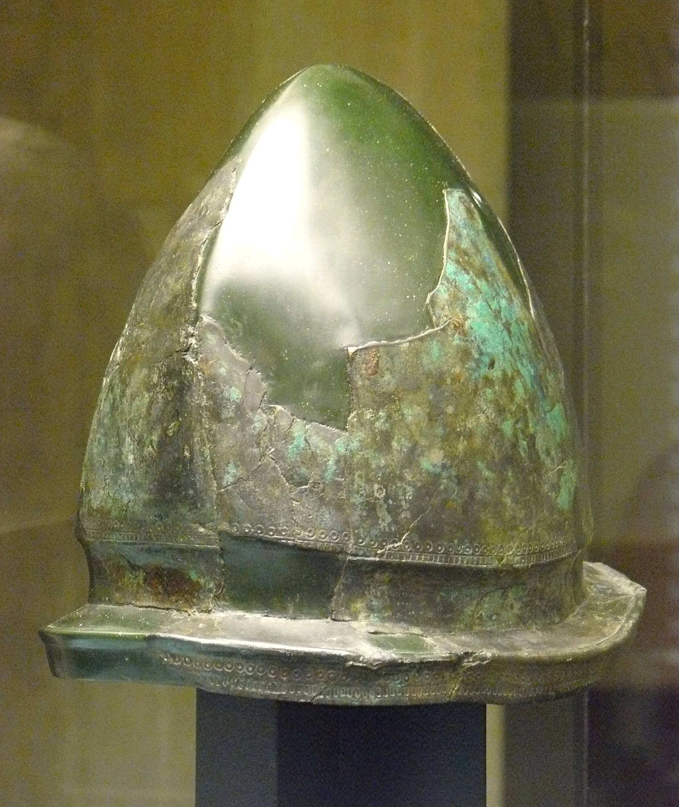 Casque en bronze de type Negau, trouvé dans une sépulture à incinération de la culture Golasecca, époque III, (Piédmond, Italie) - 480-450 av. JC. - Conservé au Musée archéologique municipal Paolo Giovio à Cômes (Italie) - photo lors de l'exposition Golasecca au Musée des Antiquités Nationales de Saint-Germain-en-Laye.